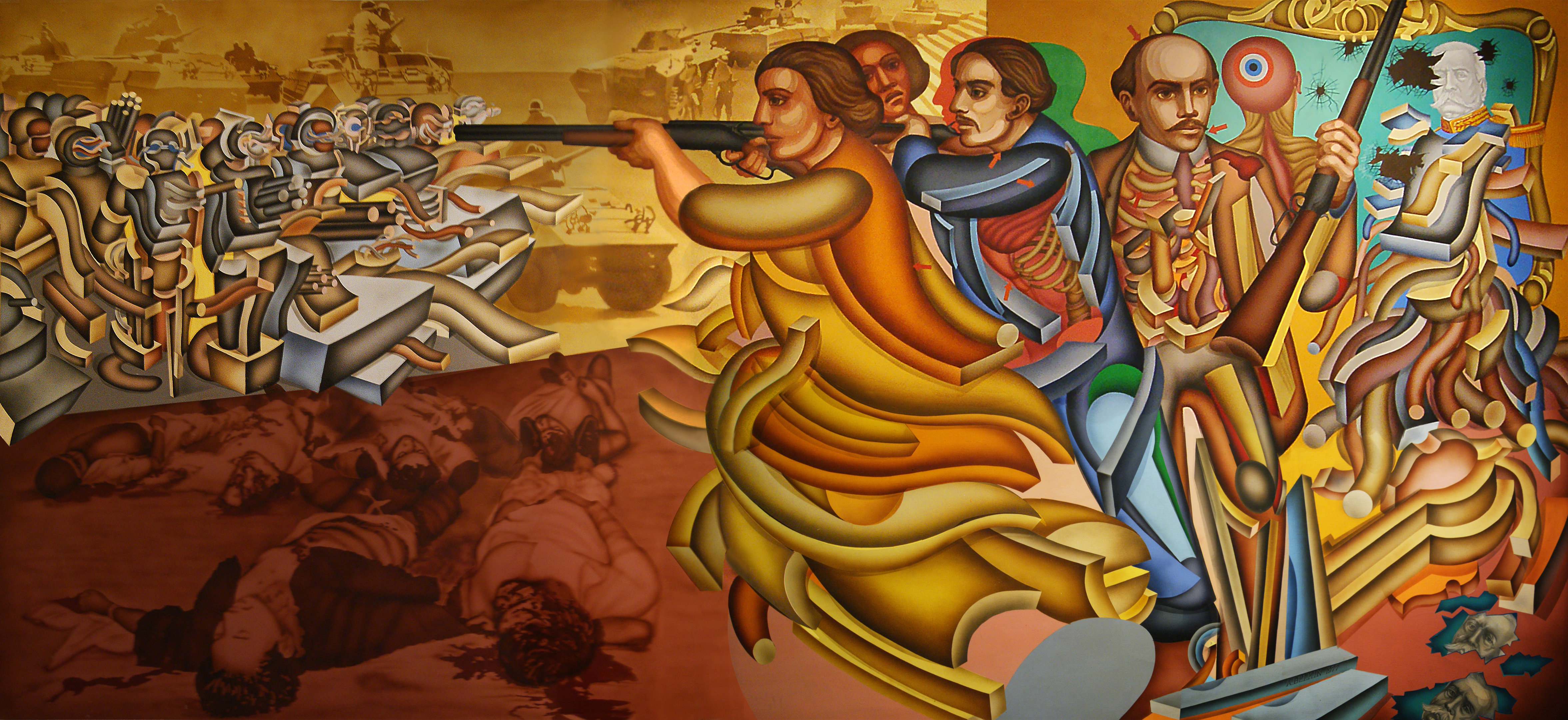 Nombre del inmueble: Museo de la Revolución “Casa de los Hermanos Serdán.” Dirección: 6 oriente 203, Centro Histórico, Puebla, Pue. Tipo de objeto: Mural Materiales: Pintura y Tela Técnica de Manufactura: Óleo sobre tela Época: Siglo XX Autor: Arnold Belkin Tema o nombre: Los hermanos Serdán. La lucha continúa. Marcas e Inscripciones: Firma en la esquina inferior derecha. A.Belkin 1977.